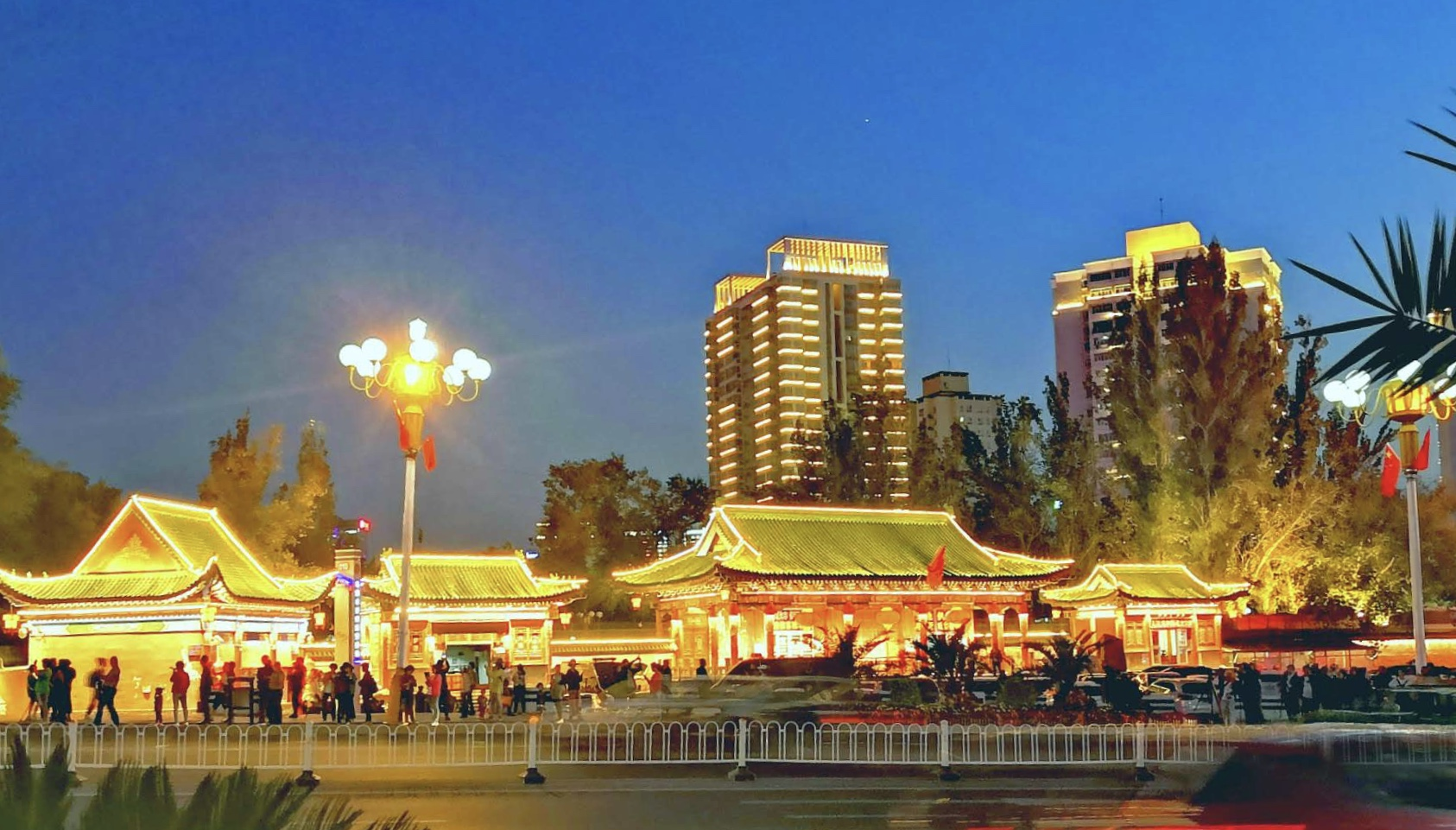 乌鲁木齐人民公园正门